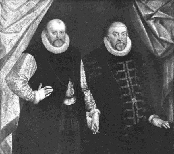 Verbüderungsbild von Kurfürst August von Sachsen und Kurfürst Johann Georg von Brandenburg 1582 von Cyriacus Roeder, Hofmaler in Dresden